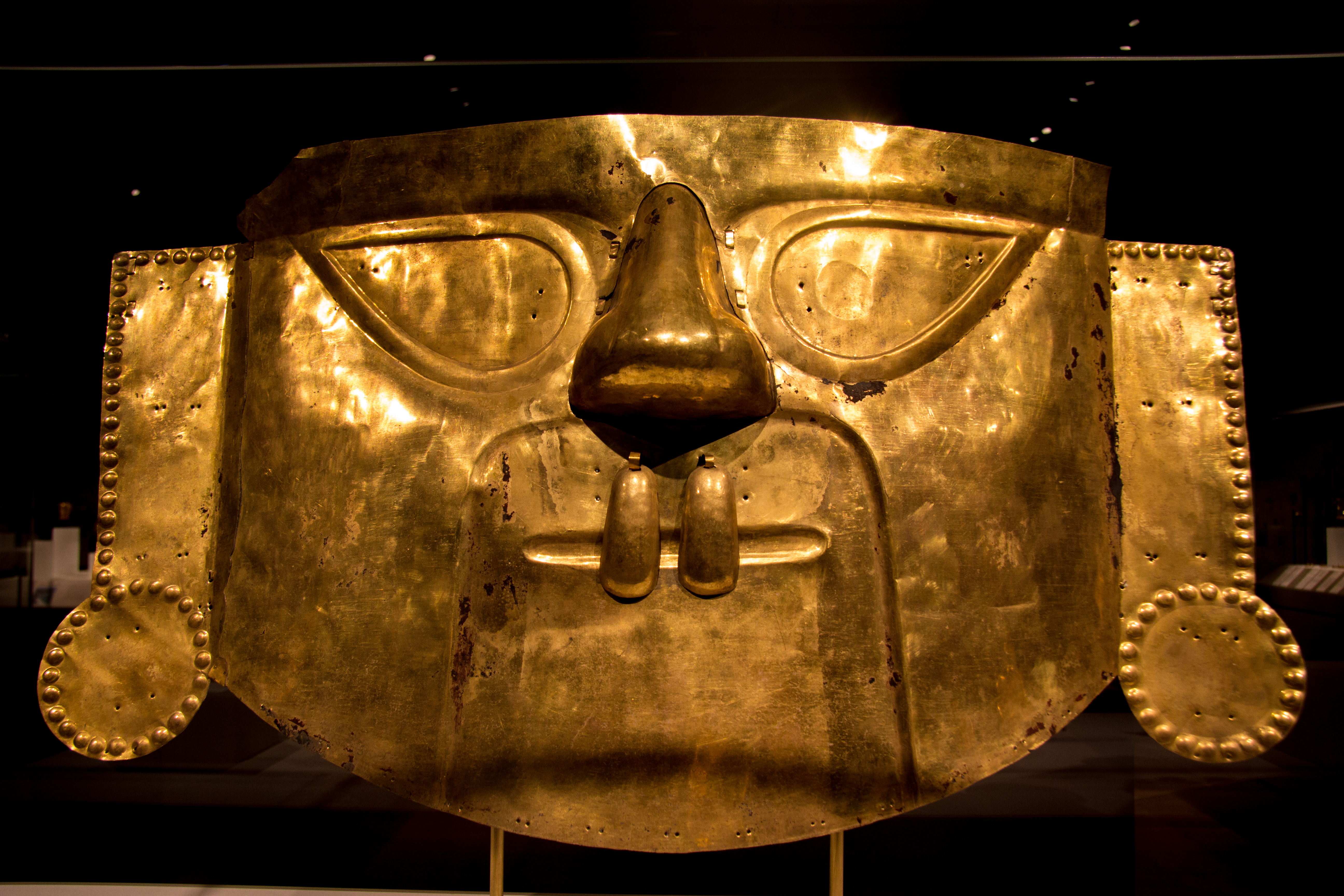 Peru, Metropolitan Museum